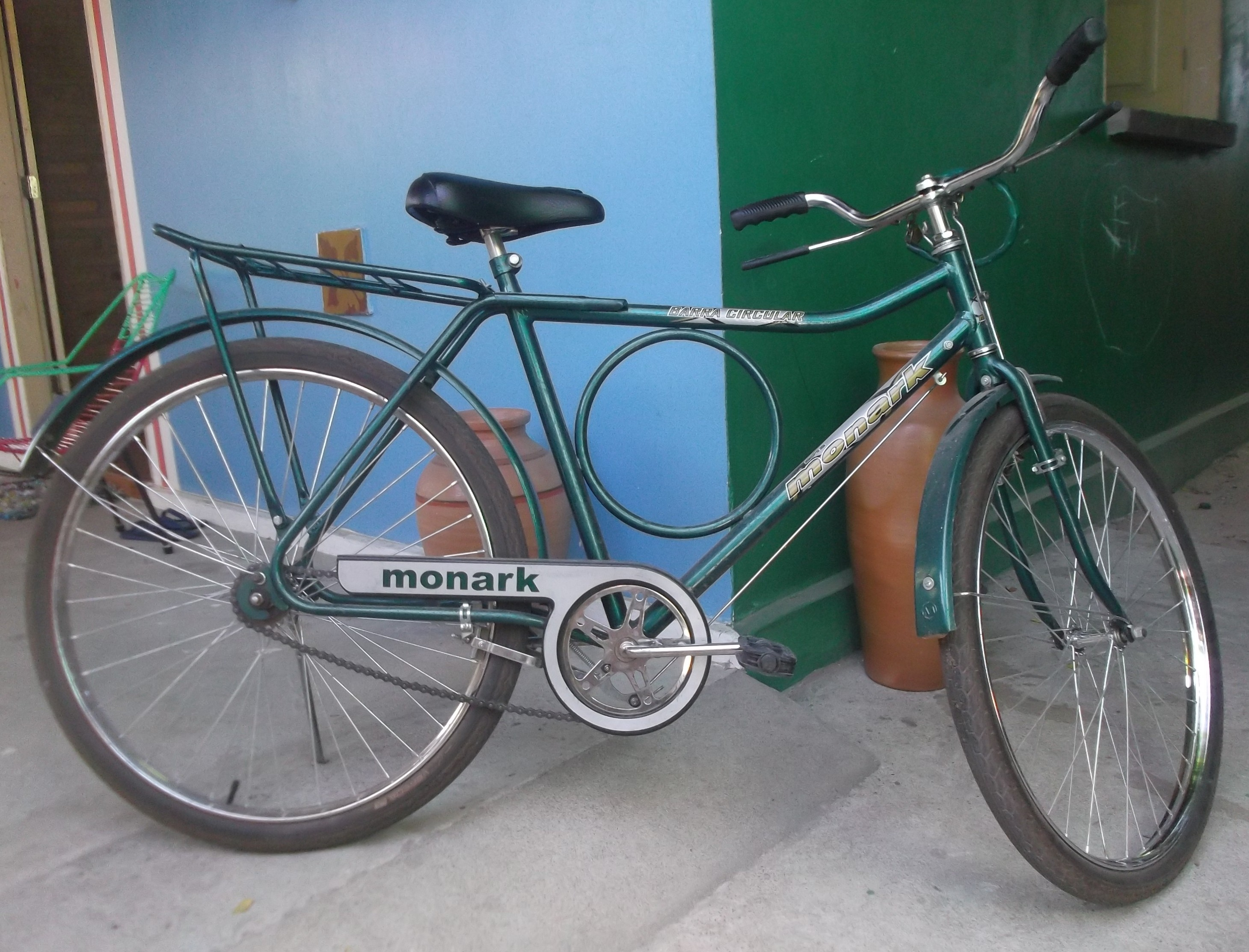 Bicicleta Monark, modelo barra circular, 2012.